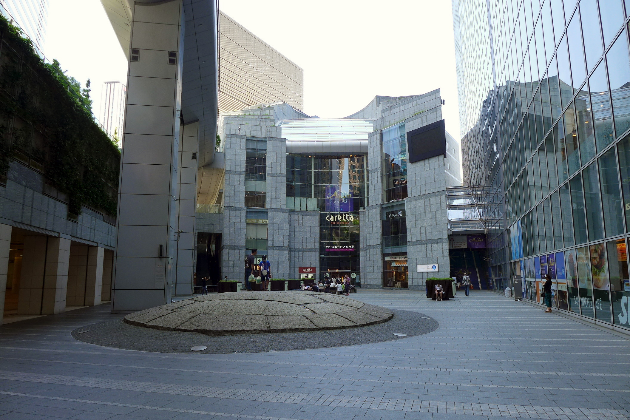 Caretta Shiodome